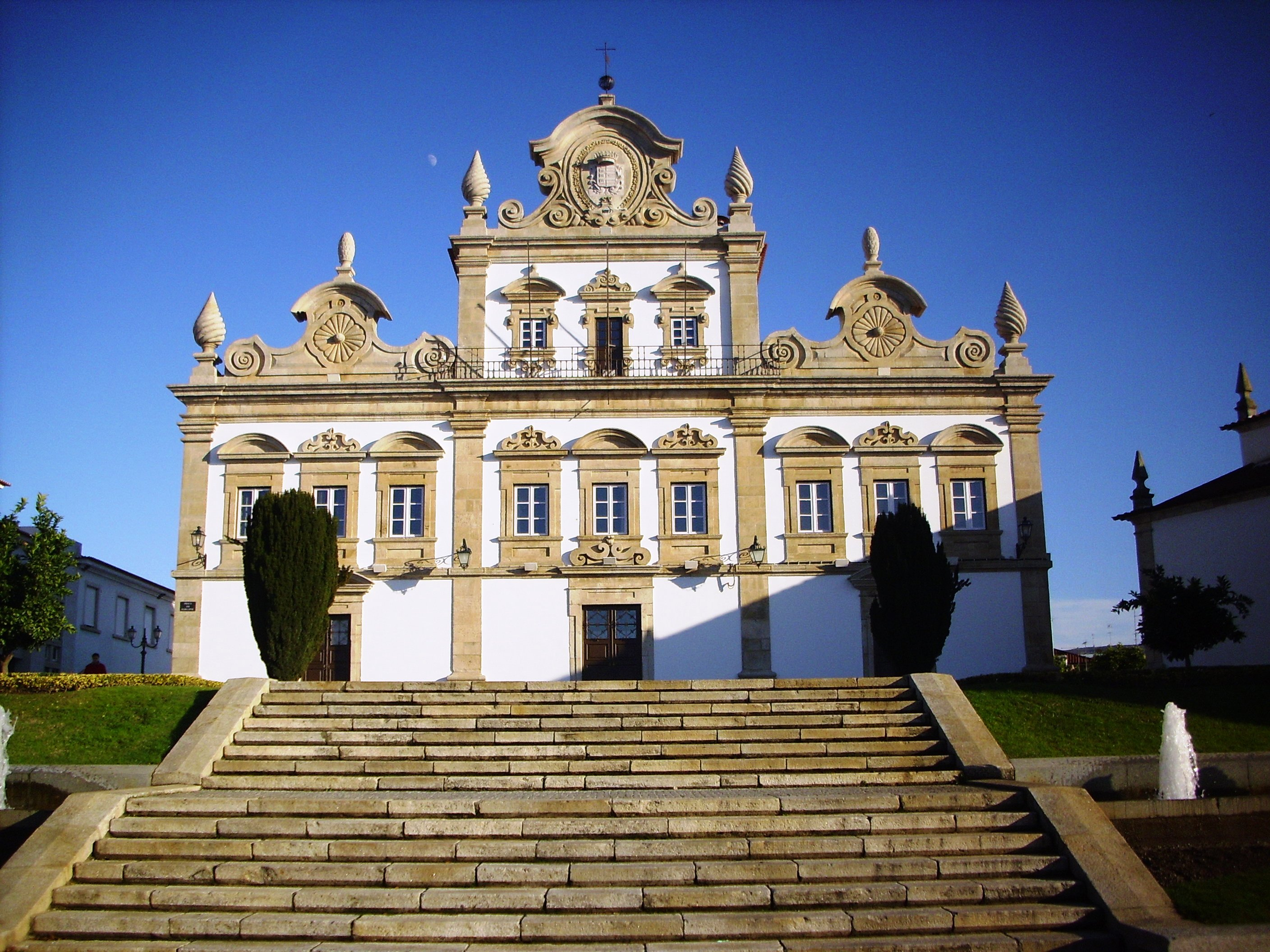 Mirandela This monument is classified as Imóvel de Interesse Público. This file was uploaded for Wiki Loves Monuments in Portugal with the unique identifier 74265.